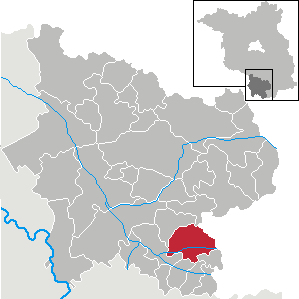 Plessa in Brandenburg (Country) - District Elbe-Elster